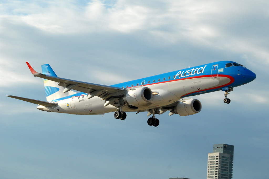 LV-CHS Embraer ERJ-190AR msn 19000402 seen at Buenos Aires Aeroparque (AEP/SABE).